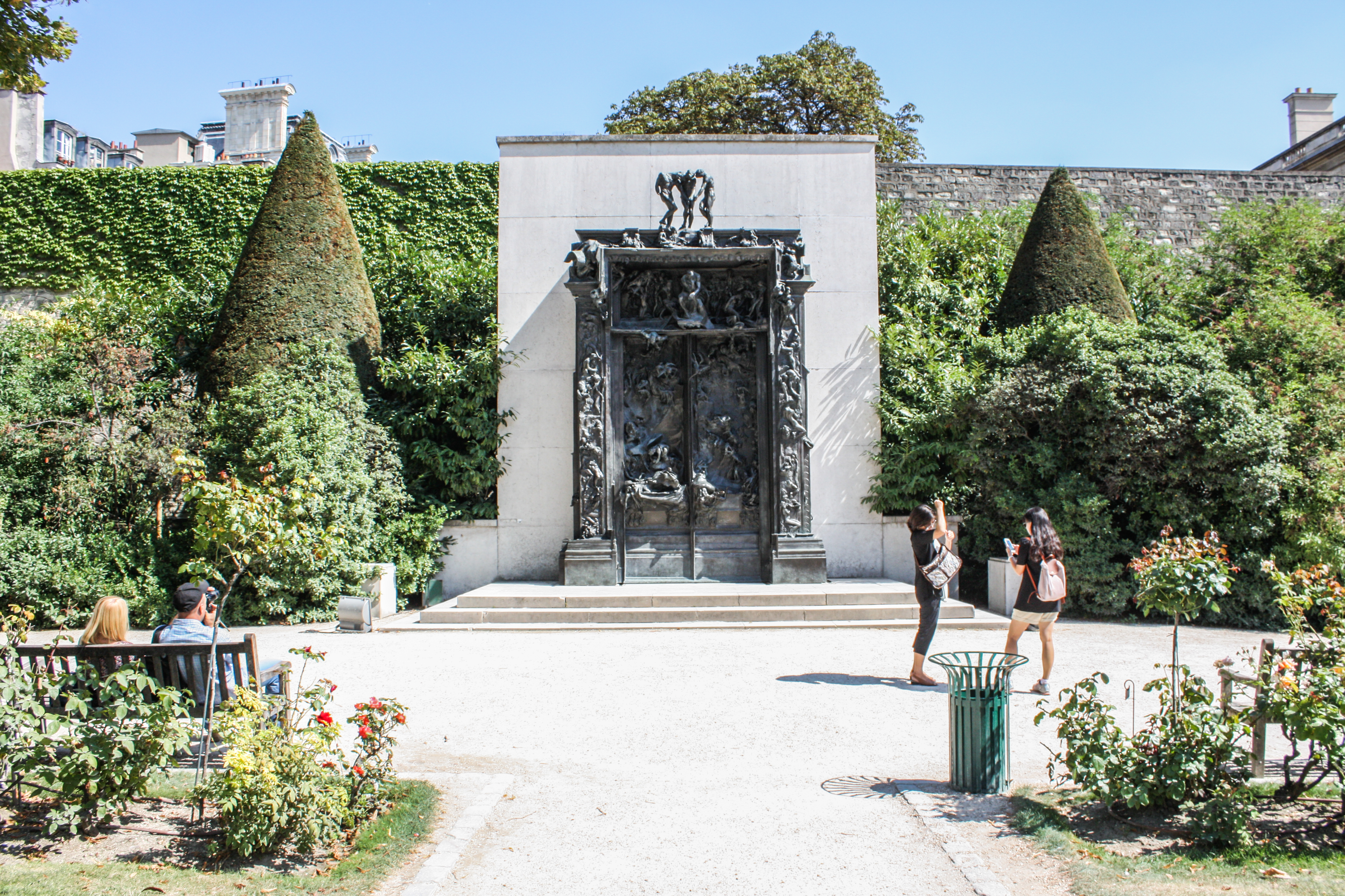 La Porte de l'enfer in the Jardin du Musée Rodin, Paris.